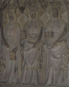 3 Bethen (Deutschland, Worms, Wormser Dom)